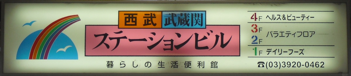 上石神井駅